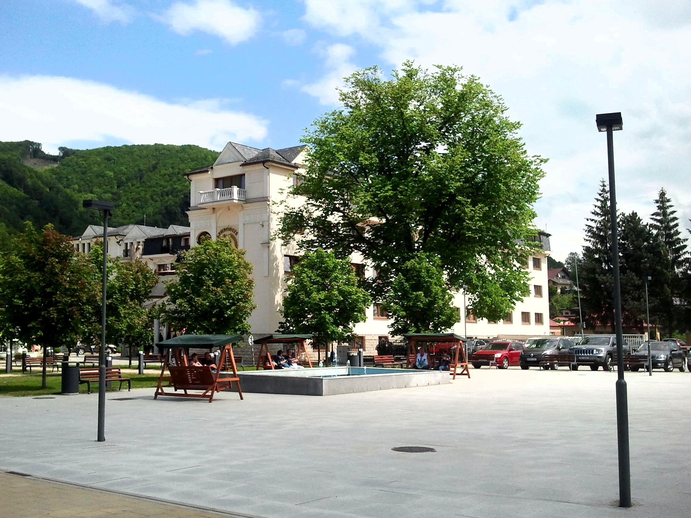 Kúpele Rajecké Teplice. Komplex Aphródite. Termálna voda je 38 stupňov teplá. Lieči choroby pohybového ústrojenstva, zápalové ochorenia centrálneho nervového systému, nervovo-svalové degeneratívne choroby aj choroby z povolania – ochorenia kostí, kĺbov, svalov a šliach. Okres Žilina. Slovensko.